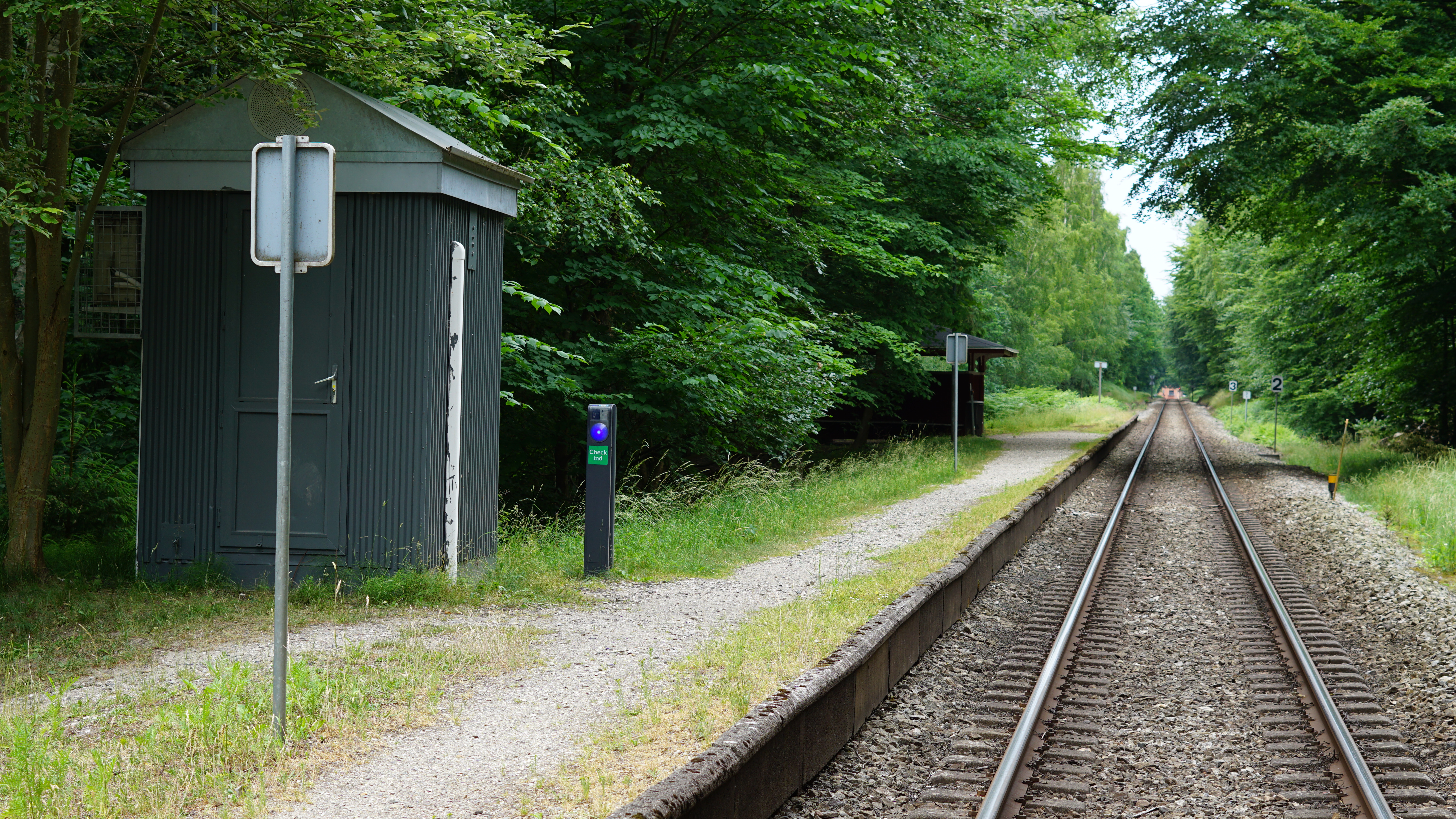 Gribsø Station